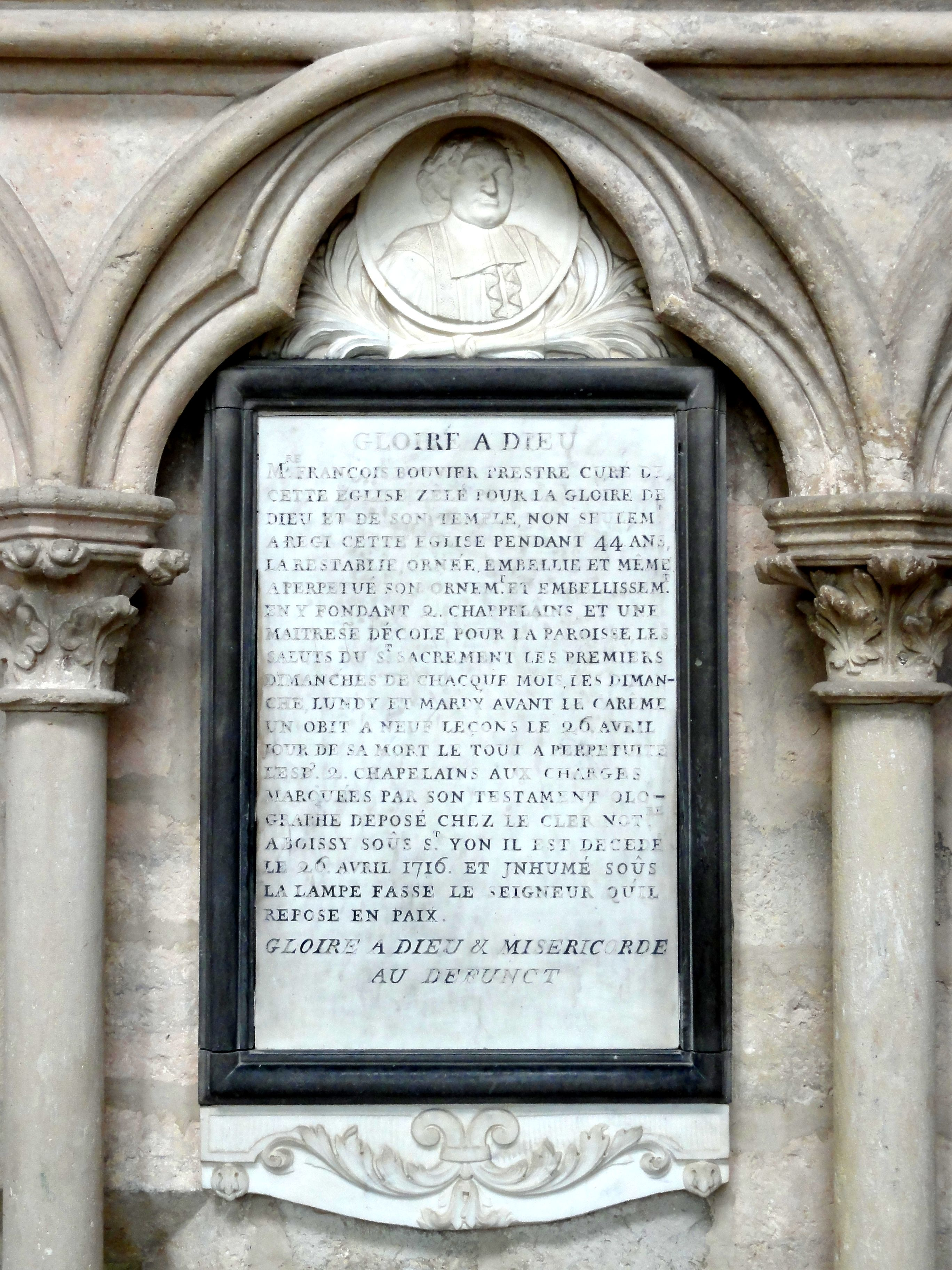 Plaque de fondation de l'abbé François Bouvier, curé pendant 44 ans, mort le 26 avril 1716.